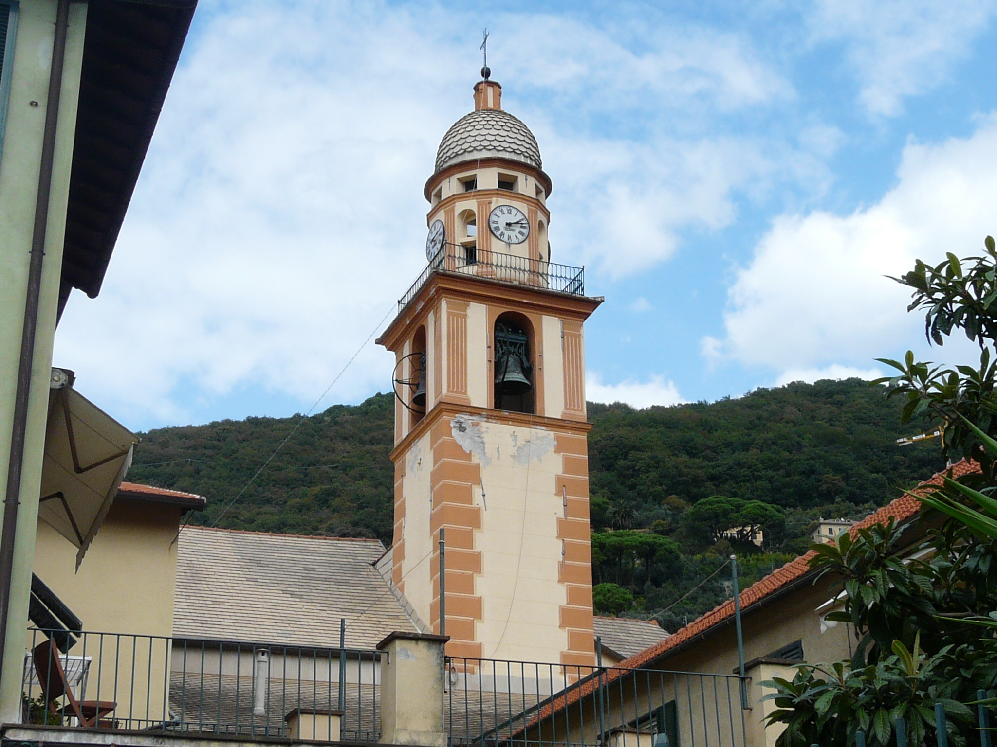 Santuario di Nostra Signora del Boschetto, Camogli, Liguria, Italia